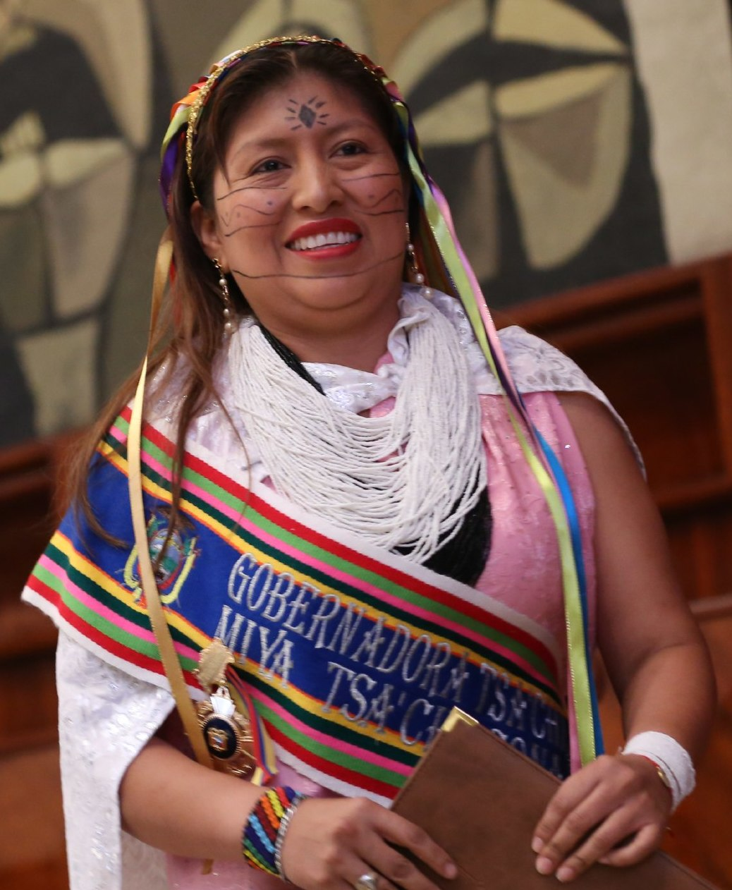 Entrega de la Condecoración "Asamblea Nacional de la República del Ecuador, Dra. Matilde Hidalgo de Procel”, al mérito social, a la Srta. Diana Aguavil, primera gobernadora mujer de la nacionalidad Tsáchila, dentro del marco de las festividades del Kasama 2019.